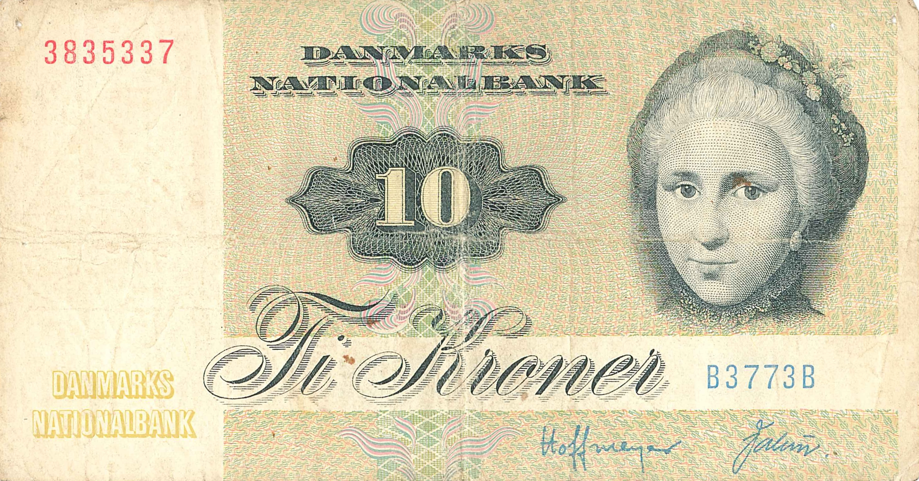 Geldschein 10 Dänische Kronen (1972)